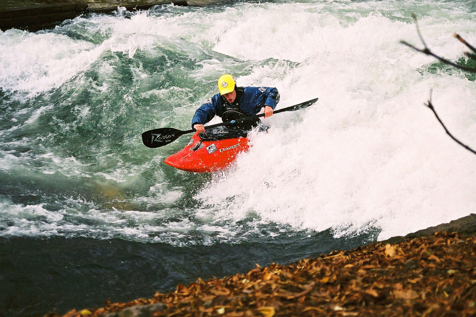 Englischer Garten, Munich Canoeing on the Eisbach